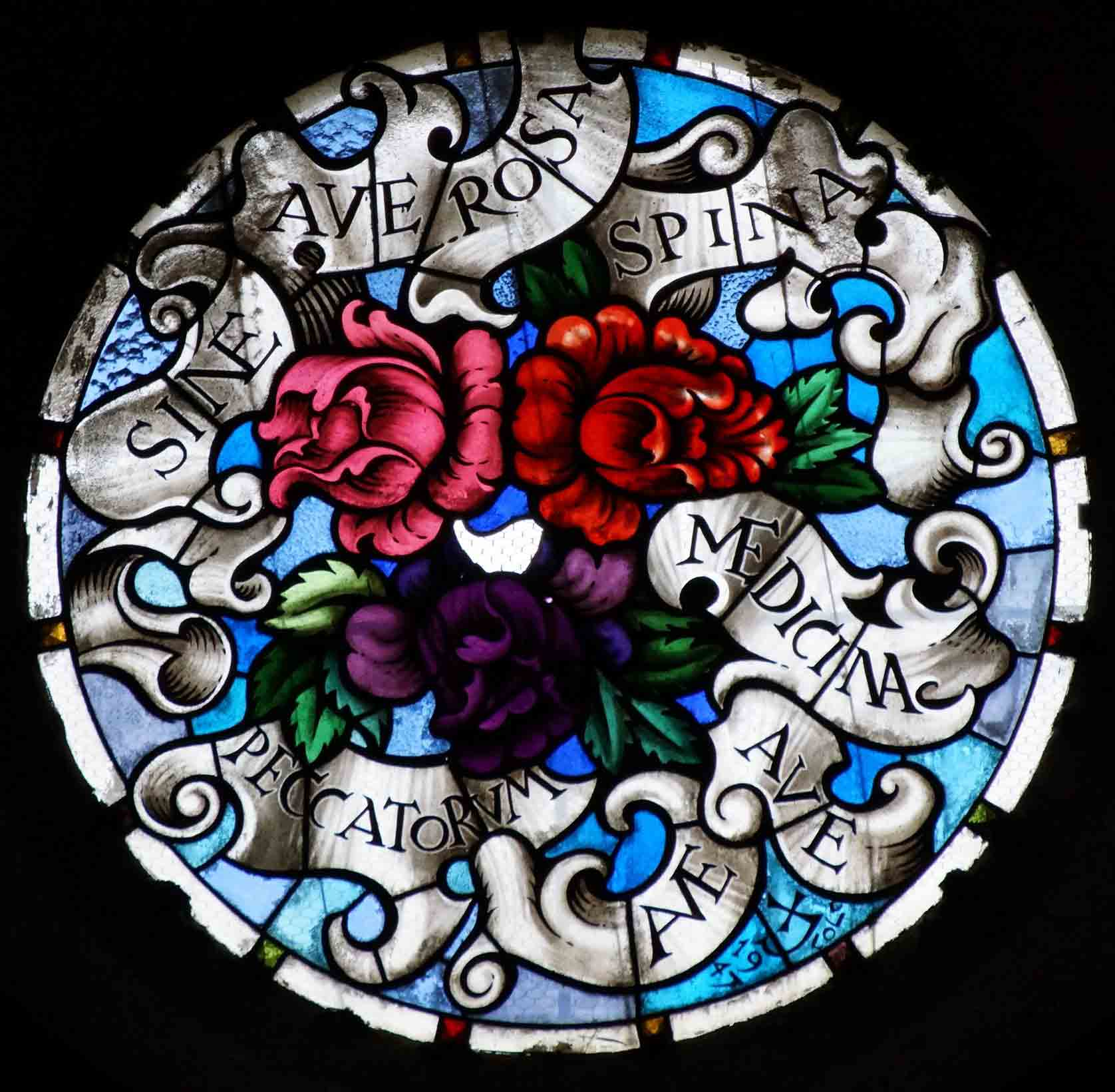 Oeuvre de J.M.Bonet et de l'architecte Jujol